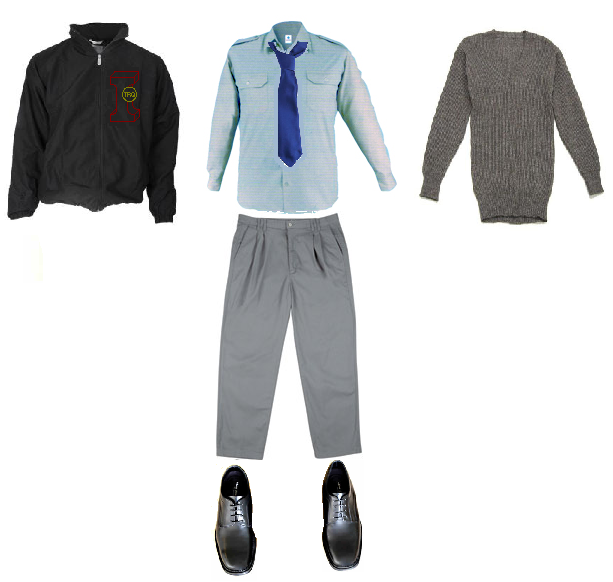 Uniforme del IMPA